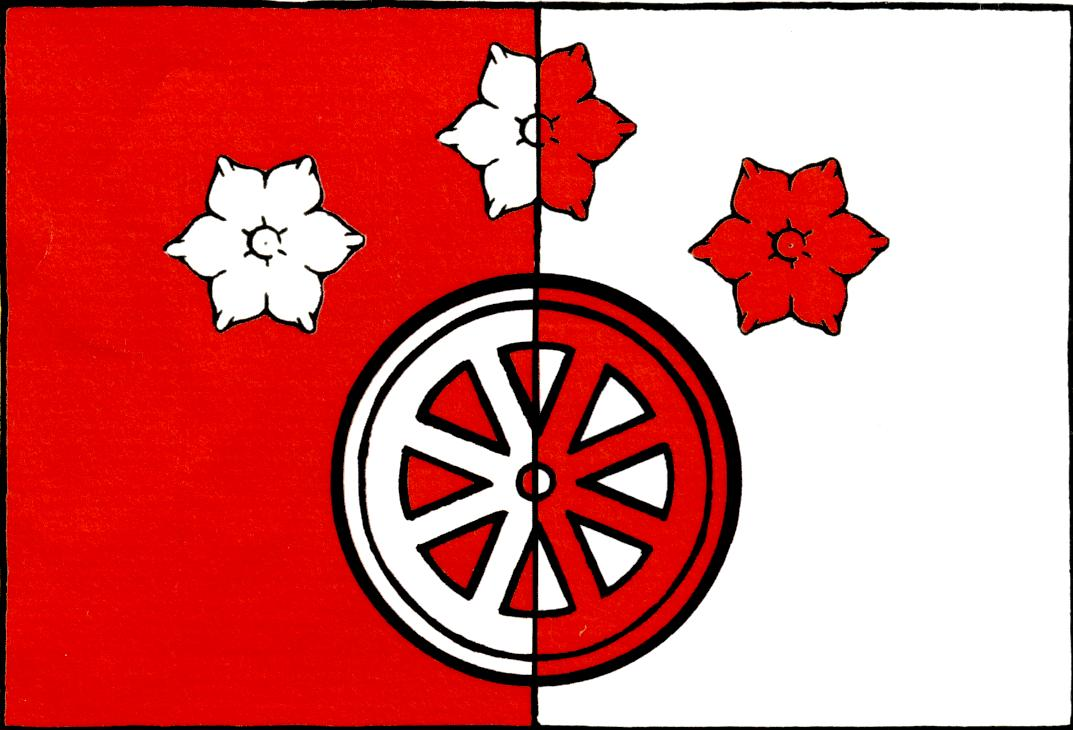 Vlajka obce Lovečkovice